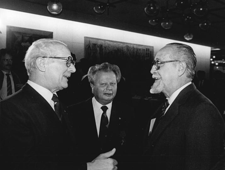 ADN-ZB Mittelstädt 23.10.87 Berlin: Jubiläum-Festakt. Mit einem Staatsakt der Deutschen Demokratischen Republik im Palast der Republik fanden die Feierlichkeiten zum 750jährigen Jubiläum Berlins ihren Höhepunkt. Begegnung des Generalsekretärs des ZK der SED und Vorsitzenden des Staatsrates der DDR, Erich Honecker, mit dem Stellvertreter des Vorsitzenden des Staatsrates und des Ministerrates der Republik Kuba, Carlos Rafael Rodriguez, Mitglied des Politbüros des ZK der KP Kubas (r.), M. Hermann Axen, Mitglied des Politbüros und Sekretär des ZK der SED.